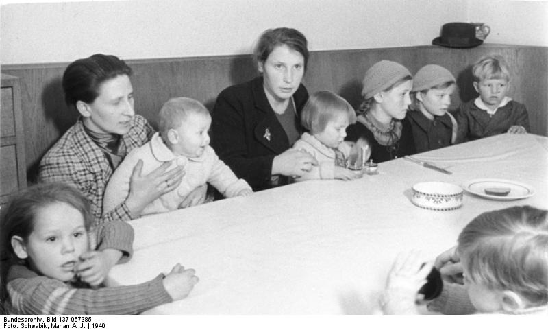 Innsbruck Südtiroler Umsiedlung: Kinder beim Essen